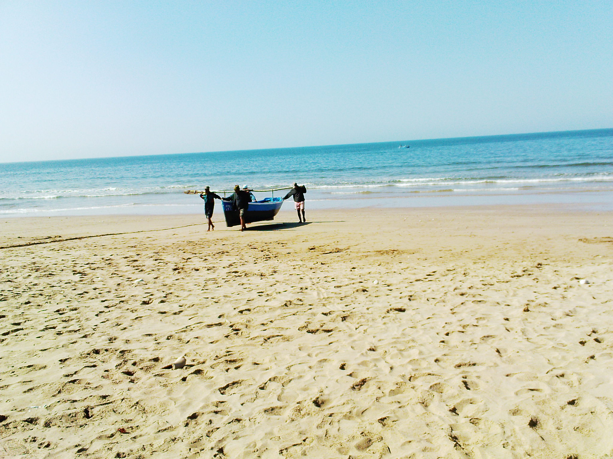 Tašlḥiyt/ⵜⴰⵛⵍⵃⵉⵜ: idwarn iy ingmar islman tamazirt lmrruk